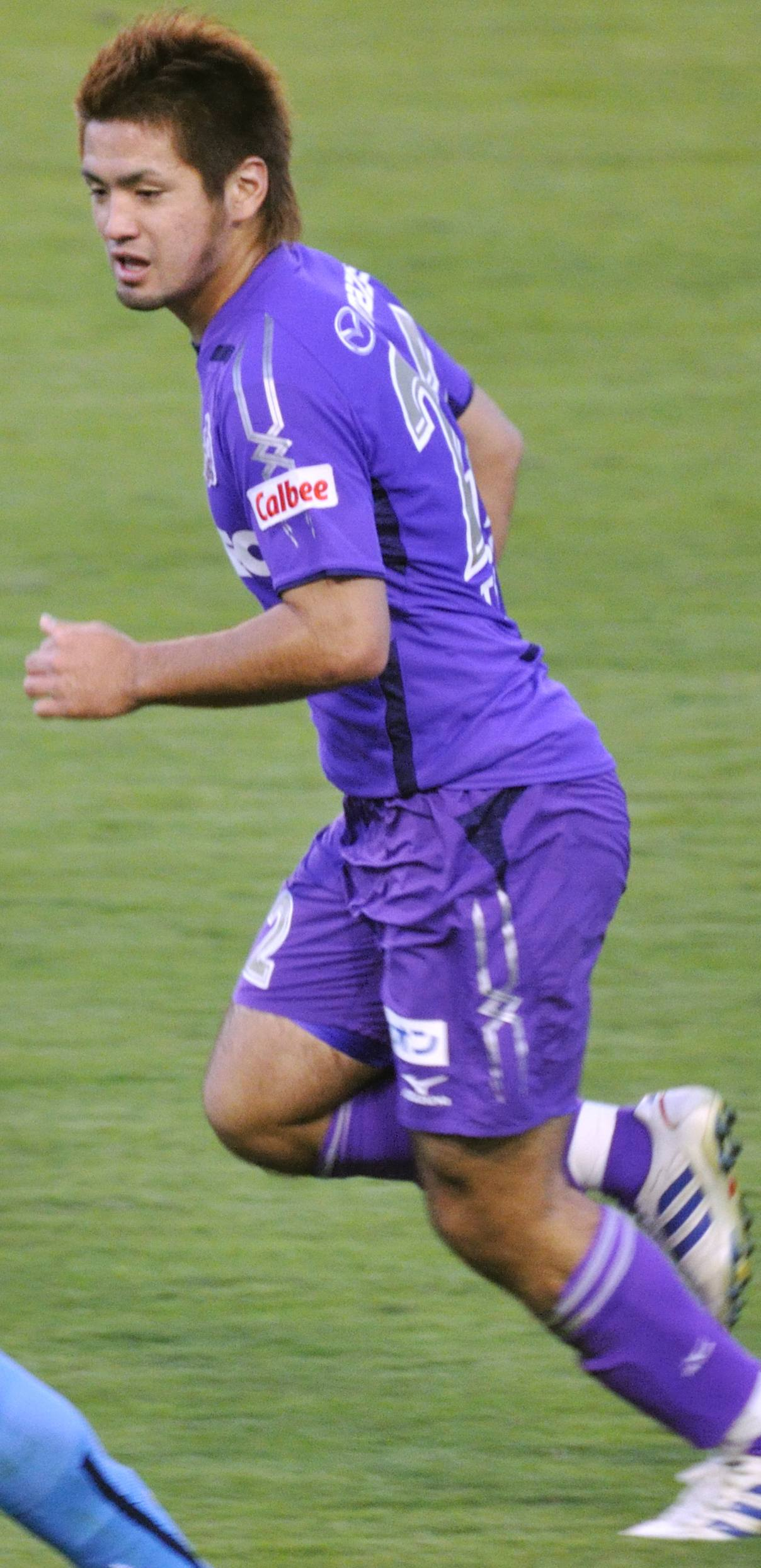 Tsubasa Yokotake cropped DSC_7752